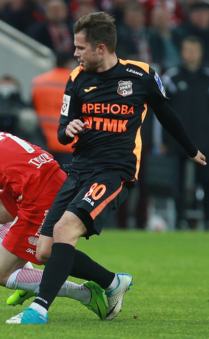 Ломакин Александр в составе ФК "Урал"